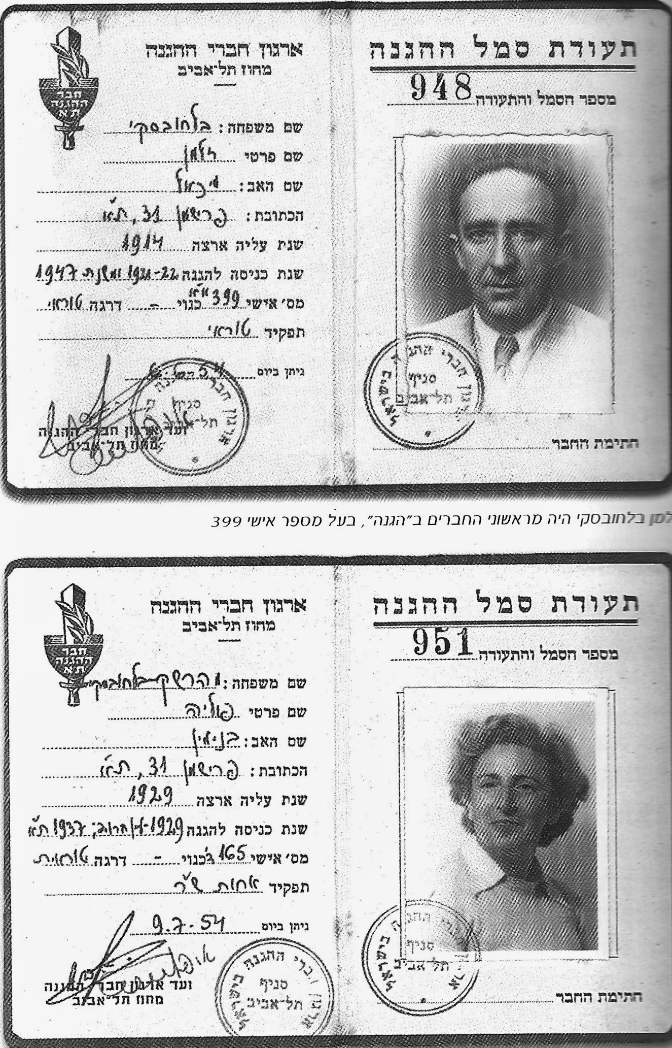 תעודות חבר ההגנה של זלמן ופולה בלחובסקי